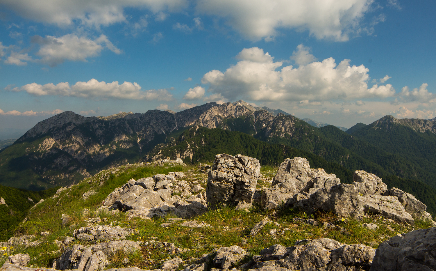 Da monte Amaro la veduta sulla camosciara e Petroso.